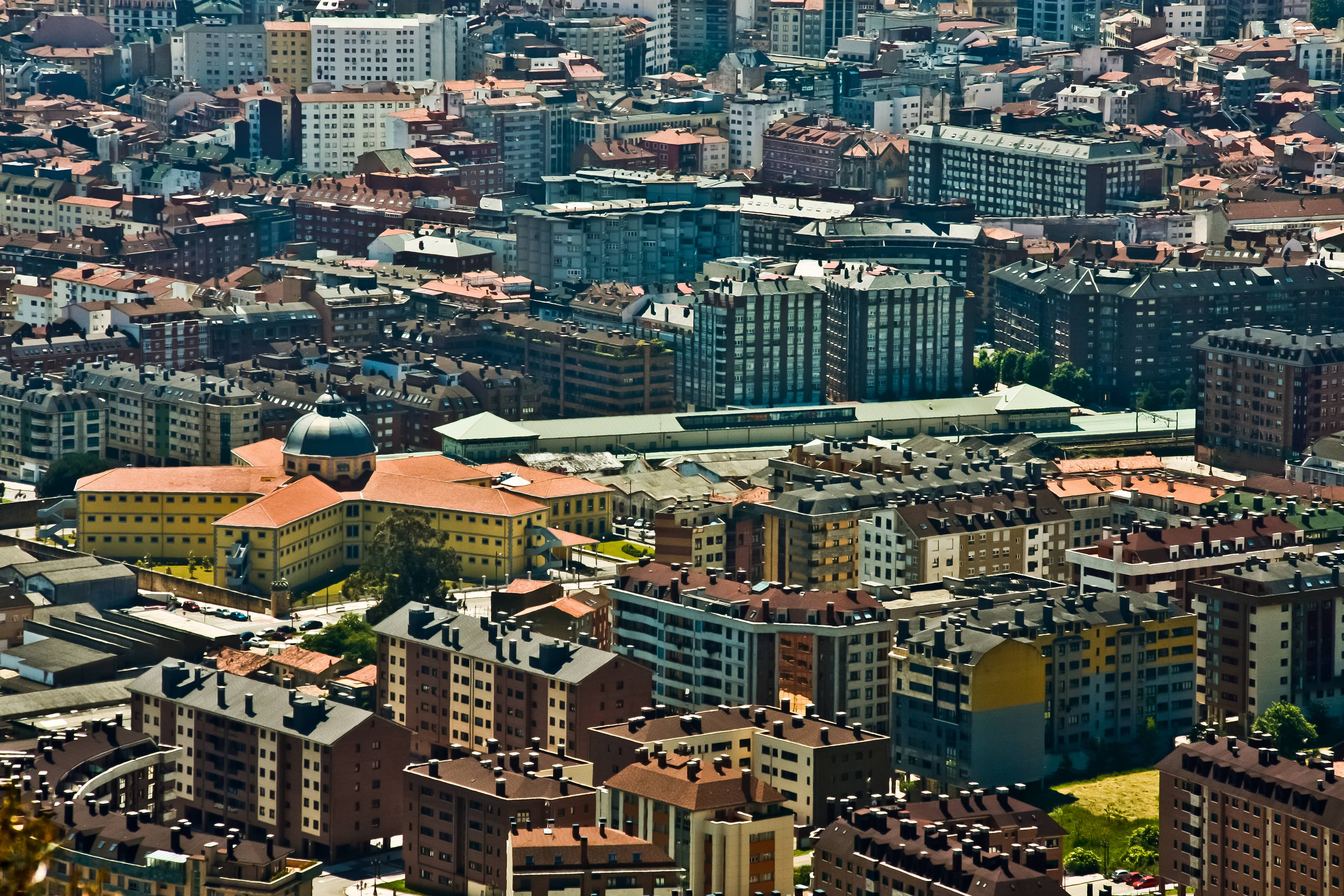 Archivo Histórico Provincial de Asturias